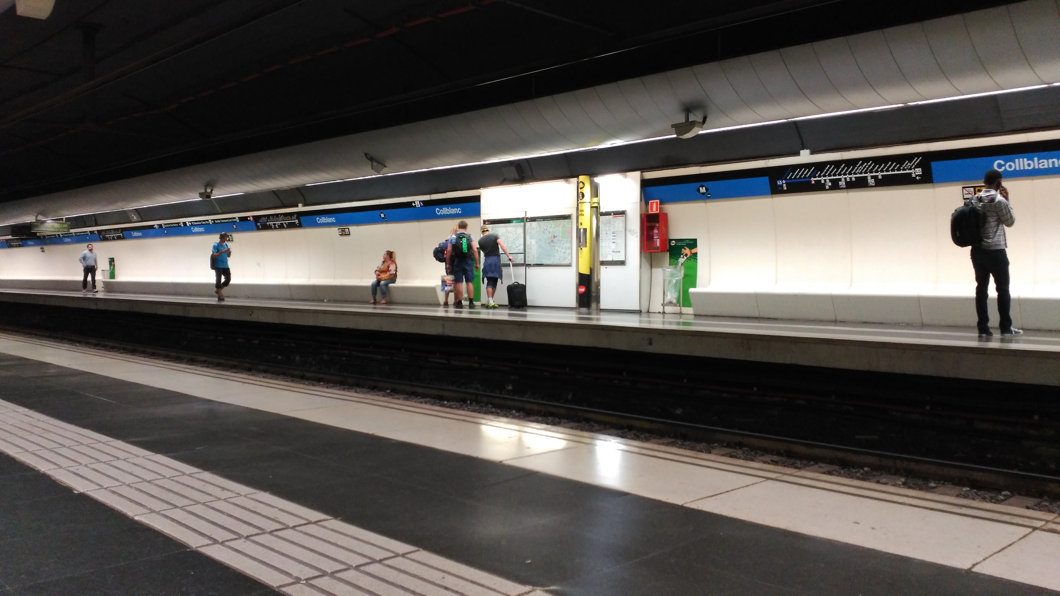 Estació de Collblanc de la línia 5 (metro de Barcelona)